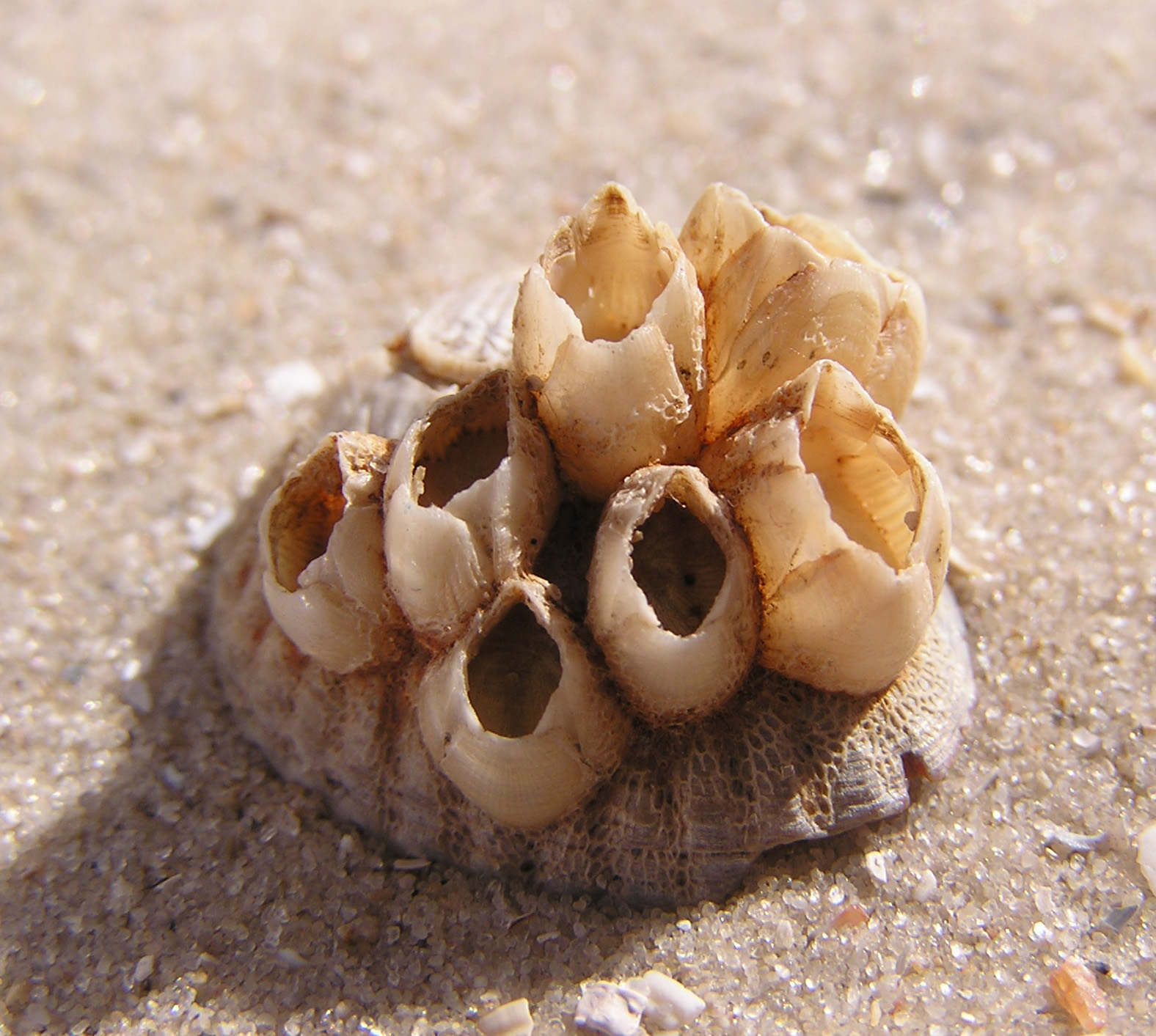 Balanus improvisus